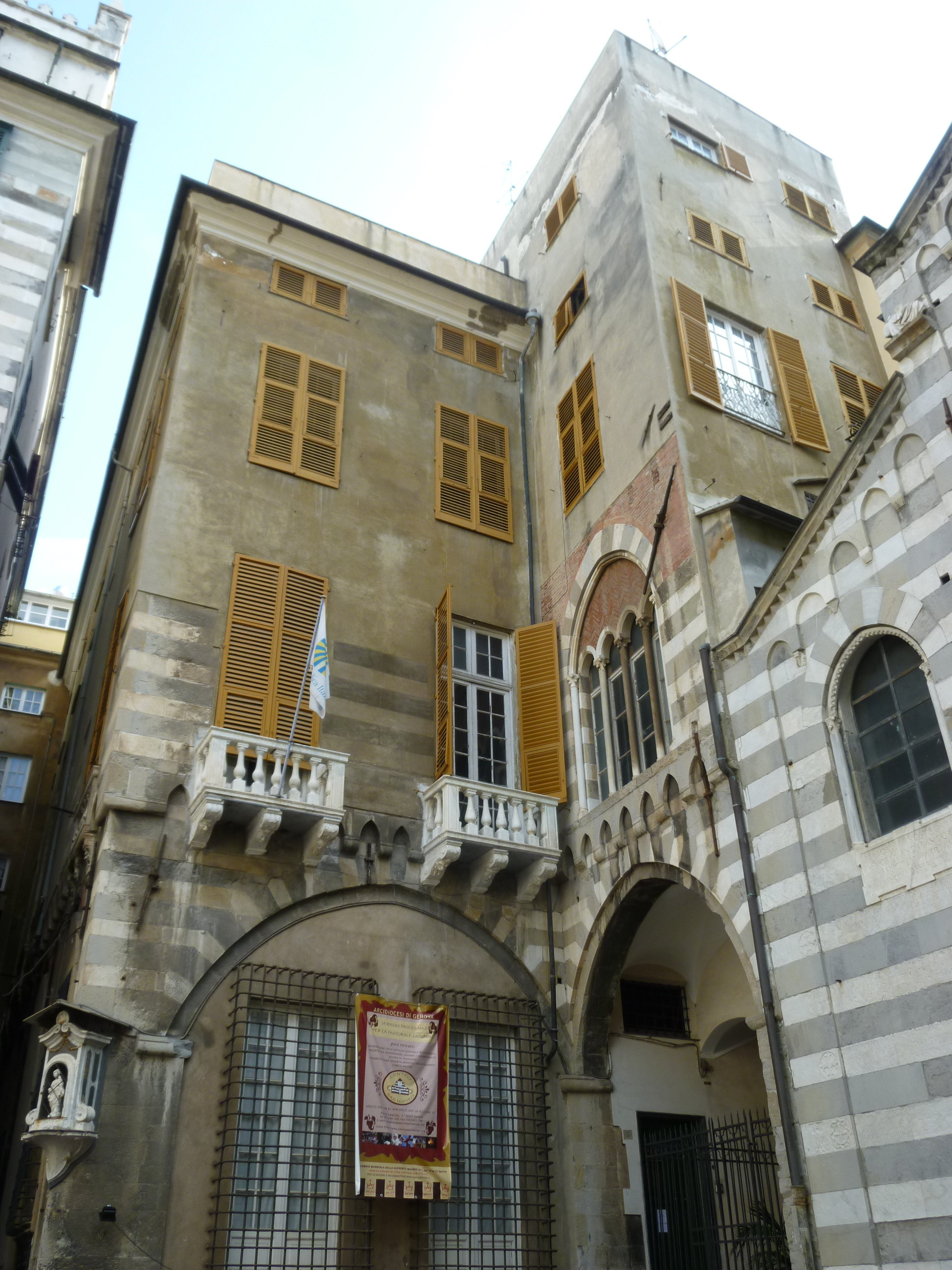 Genova